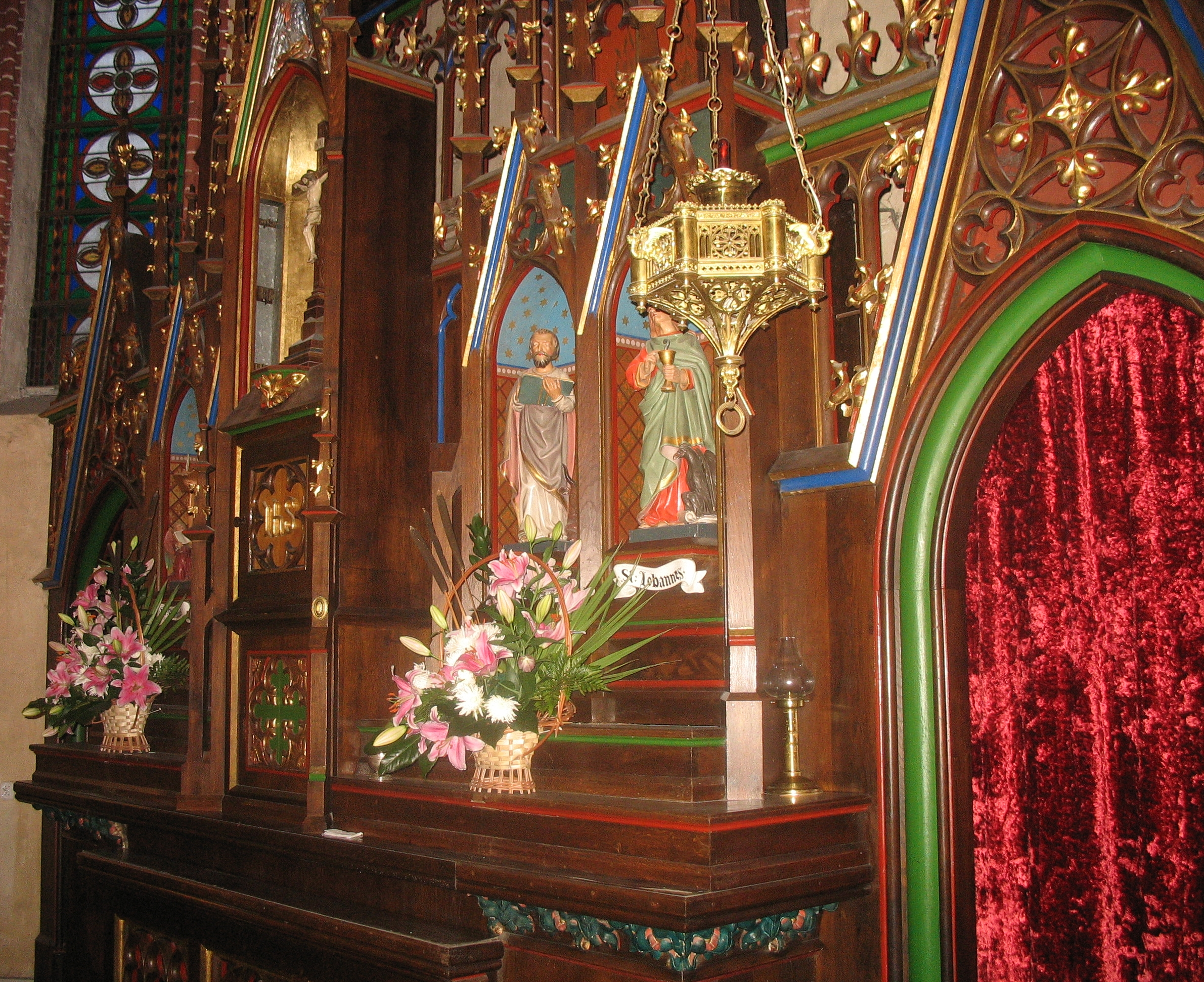 Ołtarz główny w kościele w Gniewie